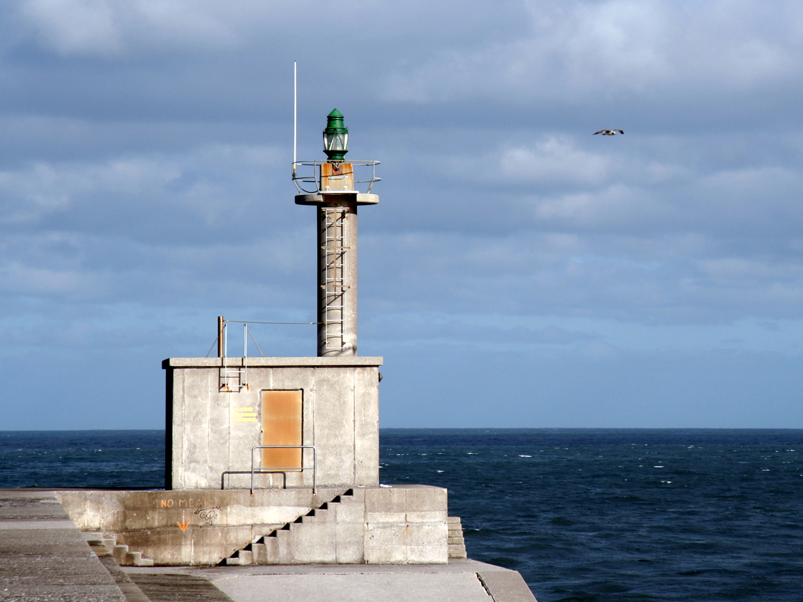 Faro de San Esteban de Pravia Autor: Ramón Noriega